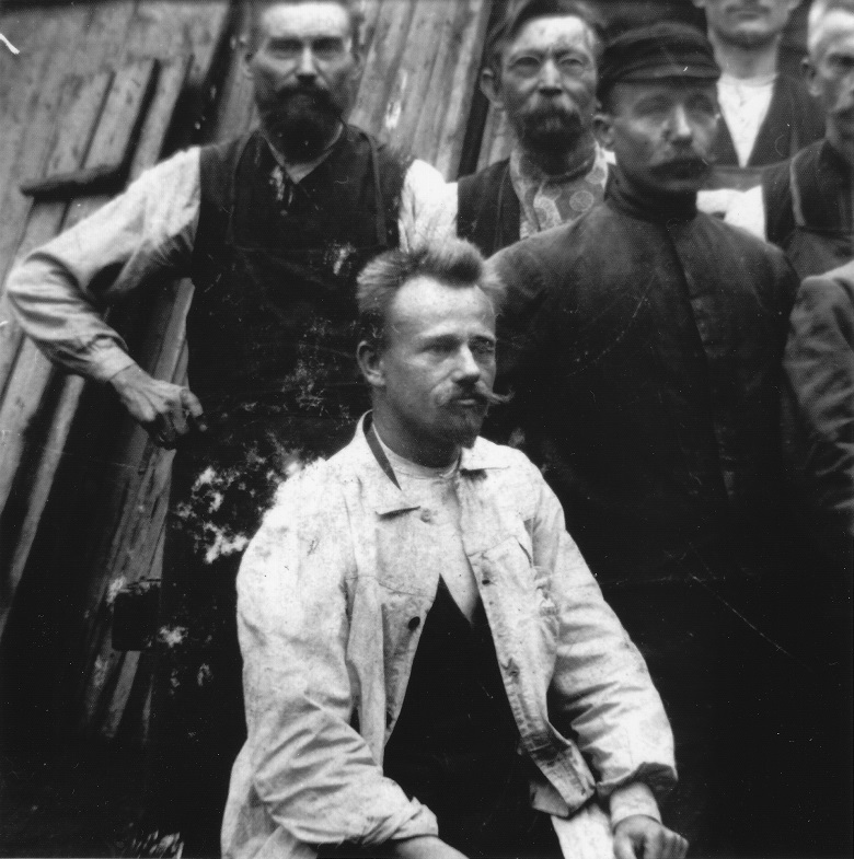 Hofbildhauer Gustav Kuntzsch, Wernigerode, inmitten seiner Mitarbeiter